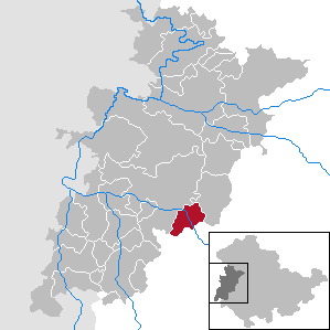 Barchfeld-Immelborn in Thuringia - Wartburgkreis